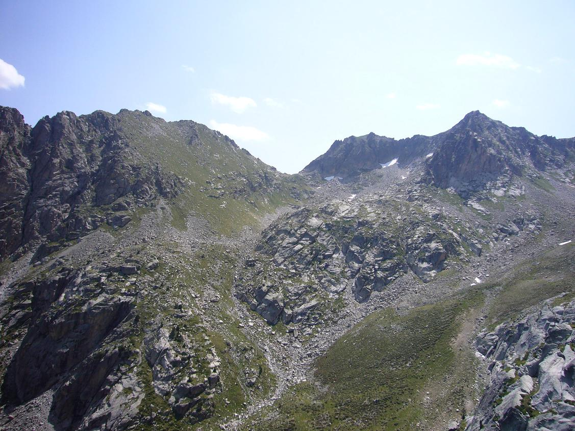 Coma d'Amitges vista de la collada que la separa de la Vall de les Corticelles. A la cresta: Coll de la Montanyeta i, a la seva esquerra, el Tossal de la Montanyeta. la Vall de Boí, Alta Ribagorça, Catalunya